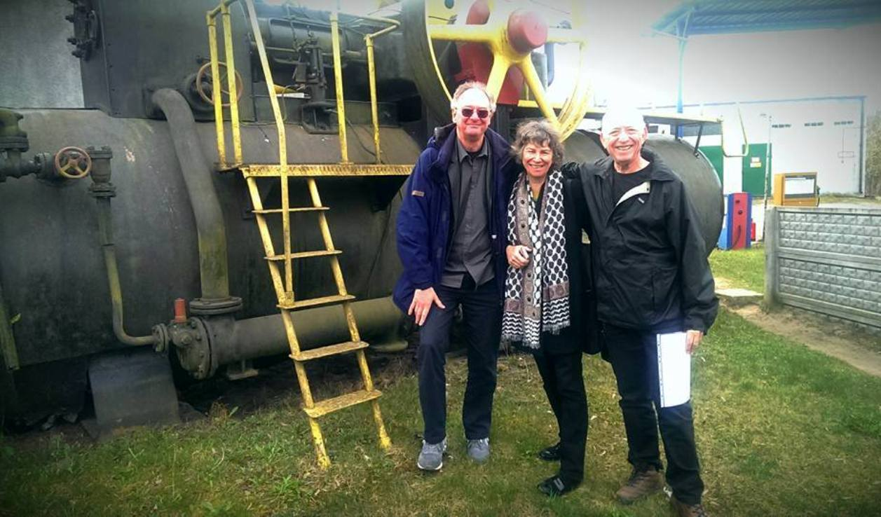 Kołacz. Maszyna parowa, obok Jacqueline Richardson, brat Nicolas Hinrichsen (L), (dzieci jedynej żyjącej córki Leo Levy`ego) i Amnon Rimon (P)